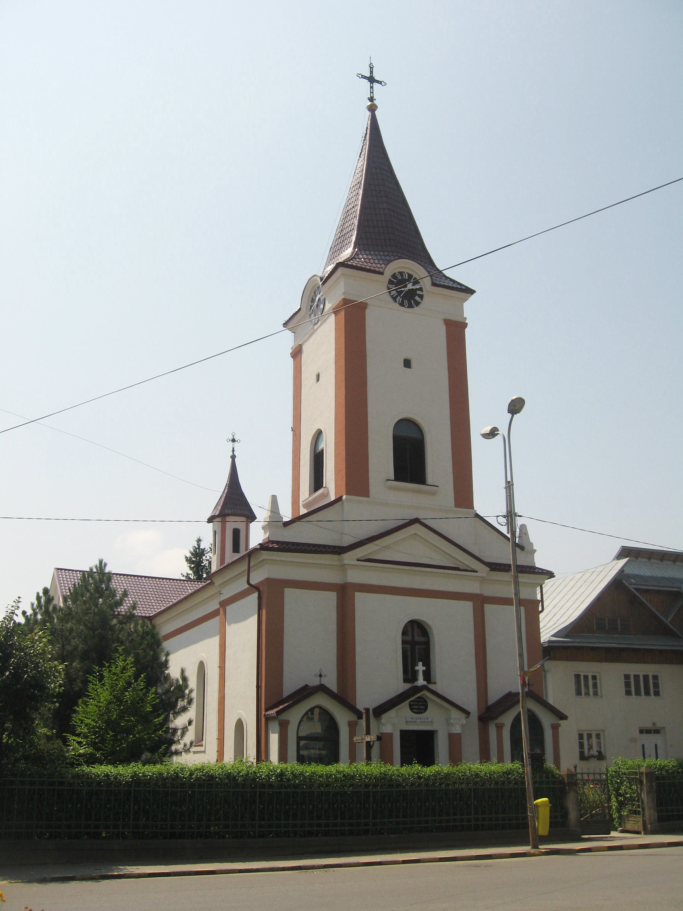 Biserica romano-catolică din Gura Humorului